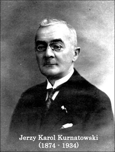 Jerzy Karol Kurnatowski (1874-1934) – polski prawnik, ekonomista i publicysta, działacz społeczności ewangelicko-reformowanej w RP